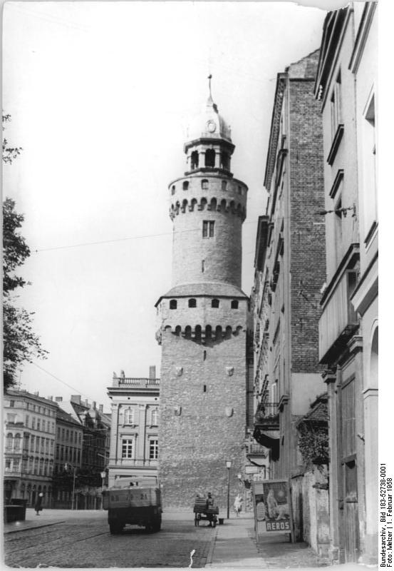 Görlitz, Reichenbacher-Turm Zentralbild Melzer 1.2.1958 Görlitz UBz: Der Reichenbacher-Turm.